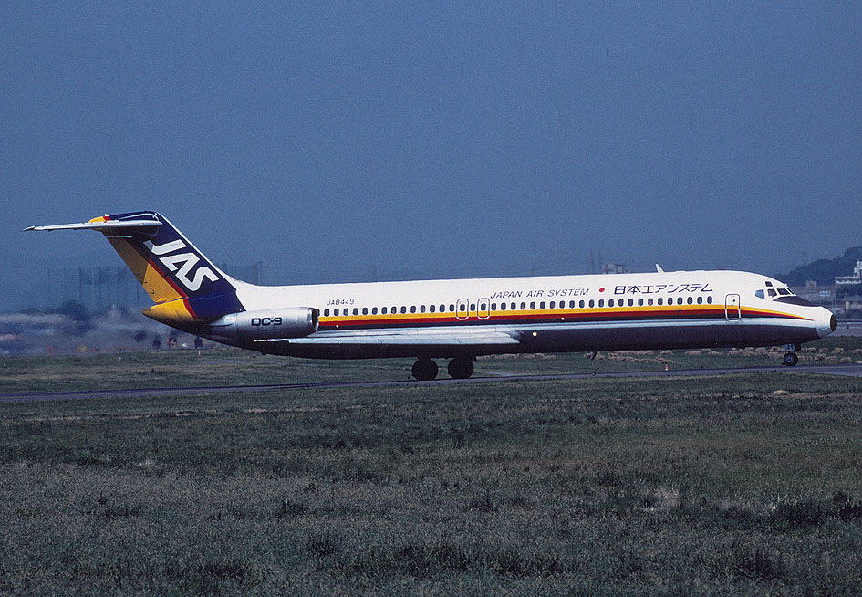 日本エアシステム DC-9-40